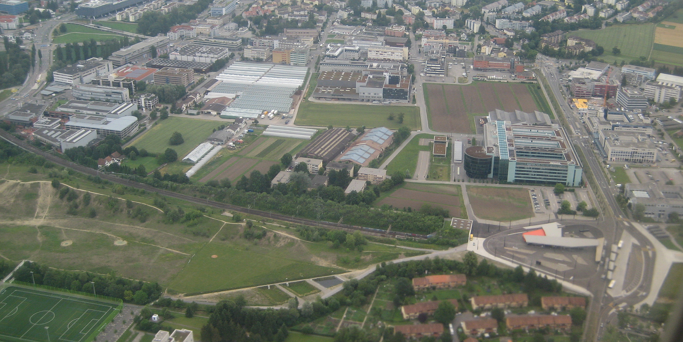 Hochbord, Dübendorf, und Verkehrsknotenpunkt Stettbach, Zürich